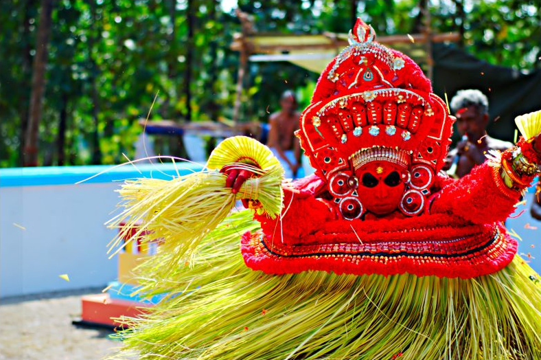 Vishnu moorthy theyyam @ naduvilathu kottam, pilathara, payyannoor, kannur. Kottam is a collection of 2 - 3 temples which is normally called in other parts of kerala. വിഷ്ണു മൂര്ത്തി തെയ്യം. കണ്ണൂരില് പയ്യന്നൂരിനടുത്തുള്ള പിലാത്തറയിലെ നടുവിലത്ത് കോട്ടത്തില് നിന്നും.